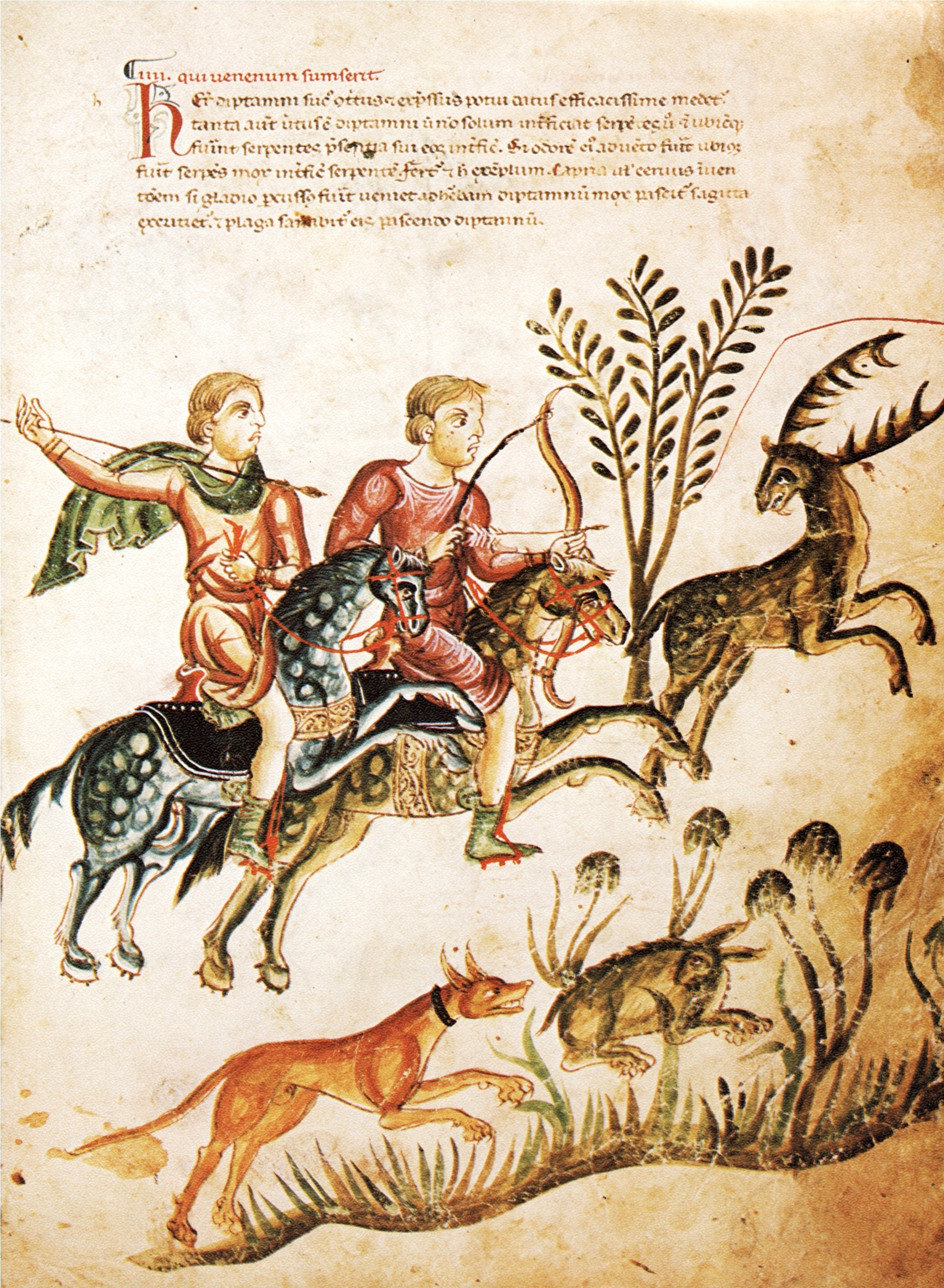 Jagdszene aus dem Kodex Medicina antiqua (fol. 70 recto). Der Text beschreibt die mythische Wirkung des Krautes Dictamnus (sofortige Heilung von Verletzungen)